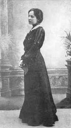 Seidler Irma magyar festő, grafikus.